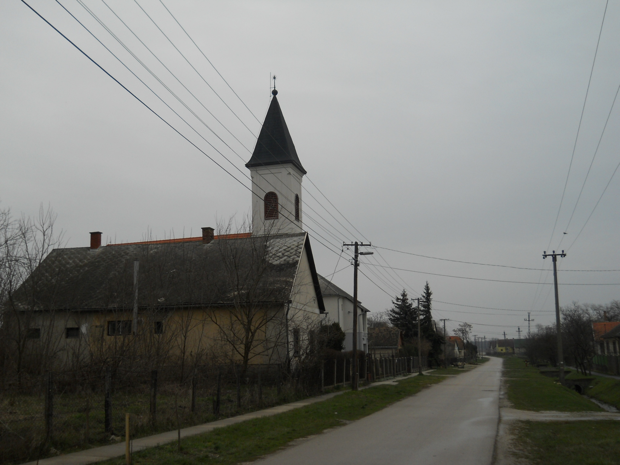 Káloz - utcarészlet a református templommal